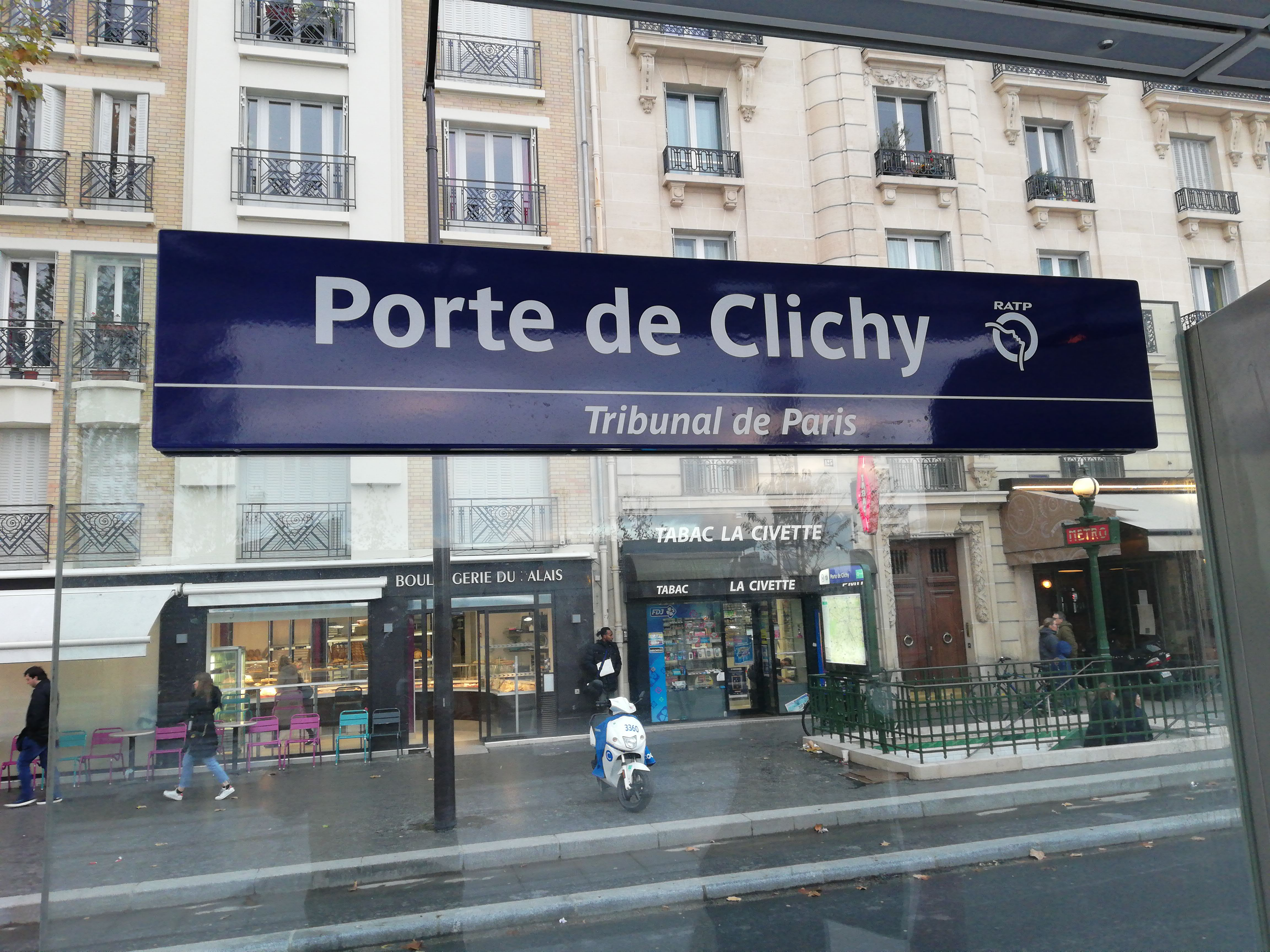 Plaque signalétique de la station Porte de Clichy - Tribunal de Paris de la ligne 3b du tramway d'Île-de-France, le jour de l'ouverture du prolongement de la ligne de Porte de la Chapelle à Porte d'Asnières, en 2018.